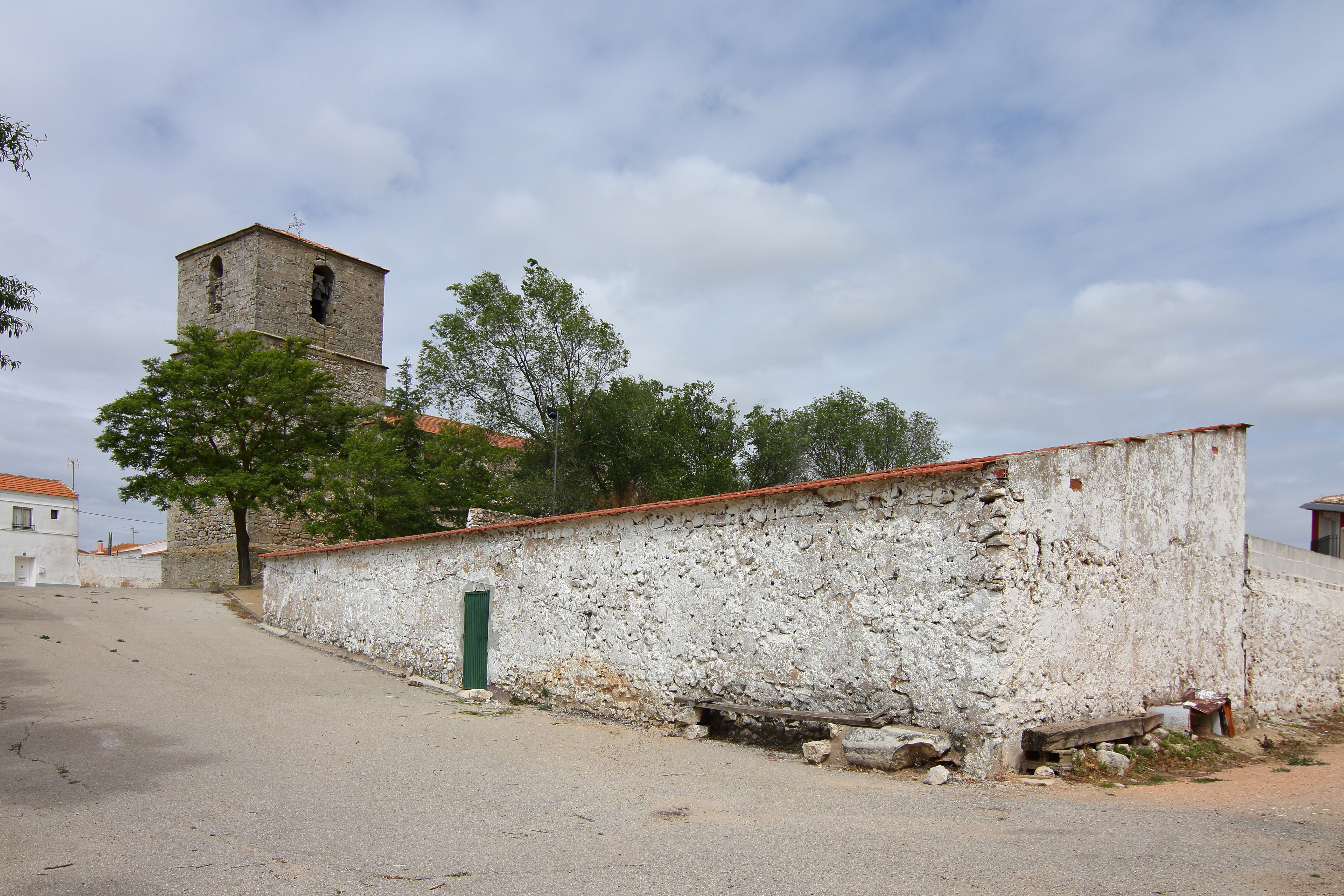 La Hinojosa, Iglesia parroquial